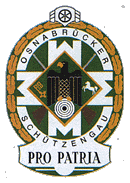 Altes Wappen des Osnabrücker Schützengaues